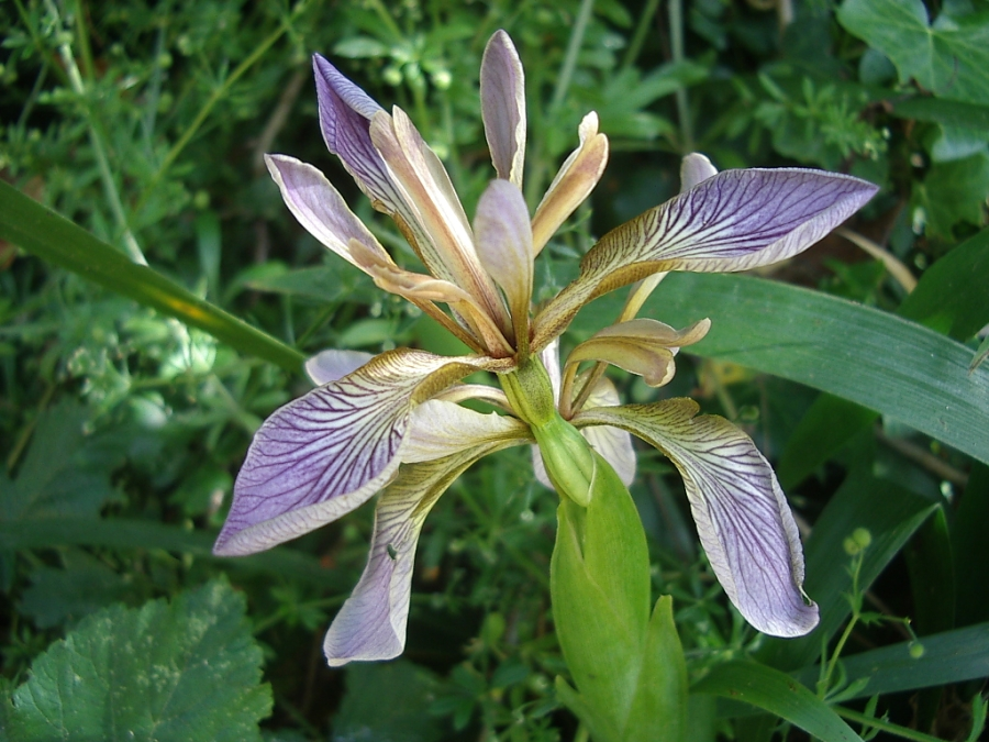 Iris foetidissima, Cap Sizun, Bretagne, France